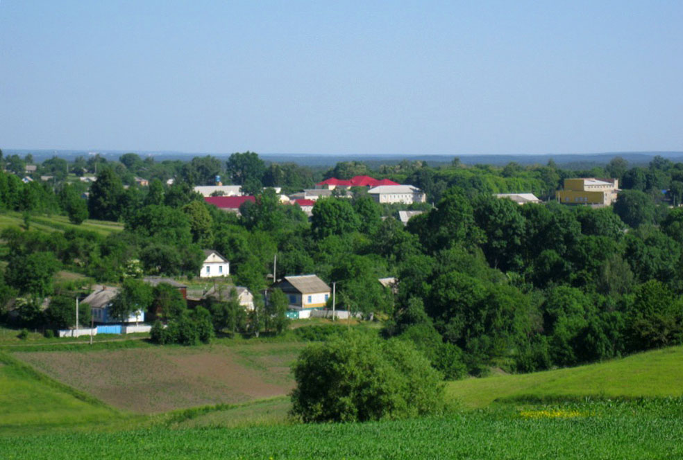 Плужне. Вигляд центральної частини